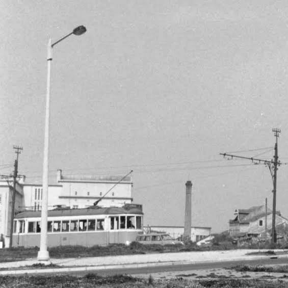 Praça de Espanha em 1964: Candeeiro de rua, carro elétrico, hospital de Oncologia, poste de via aérea, chaminé de fábrica.